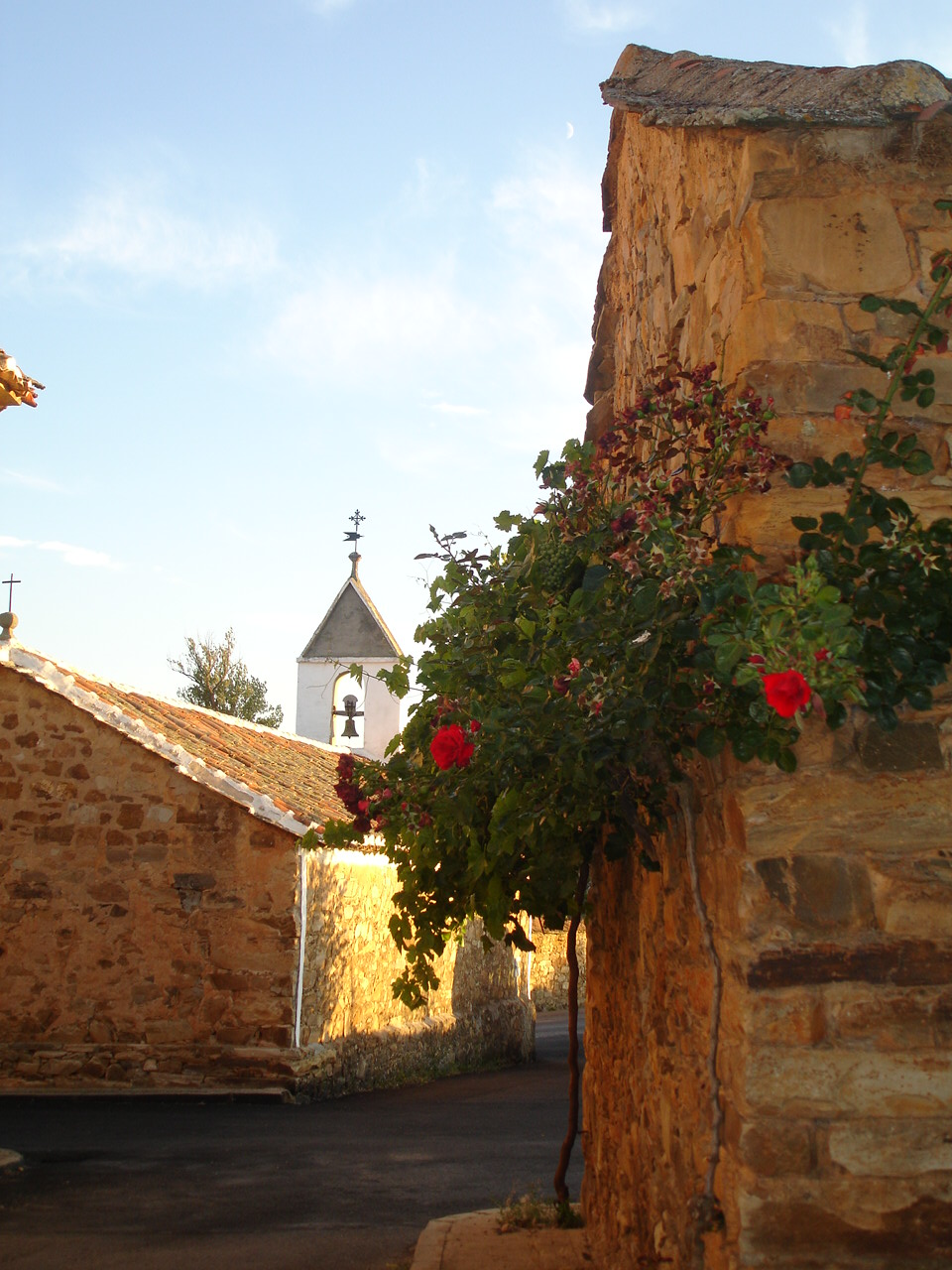 Valdespino de Somoza, Maragateria, León